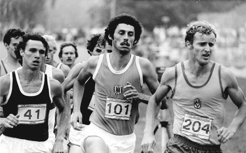 Olaf Beyer, Andreas Busse, Lutz Zauber ADN-ZB Thieme 9.8.81 Jena: 32. DDR-Leichtathletikmeisterschaften- Olaf Beyer (r.) wurde Sieger im 800-m-Lauf vor Andreas Busse (Mitte) und Lutz Zauber. Über 1500 m wurde Olaf Beyer mit 3:46,43 ebenfalls Erster und holte sich zum fünften Mal den Meistertitel. Der Sportler vom ASK Potsdam erhielt einen Ehrenpreis des Generalsekretärs des ZK der SED und Vorsitzenden des Staatsrates der DDR, Erich Honecker.